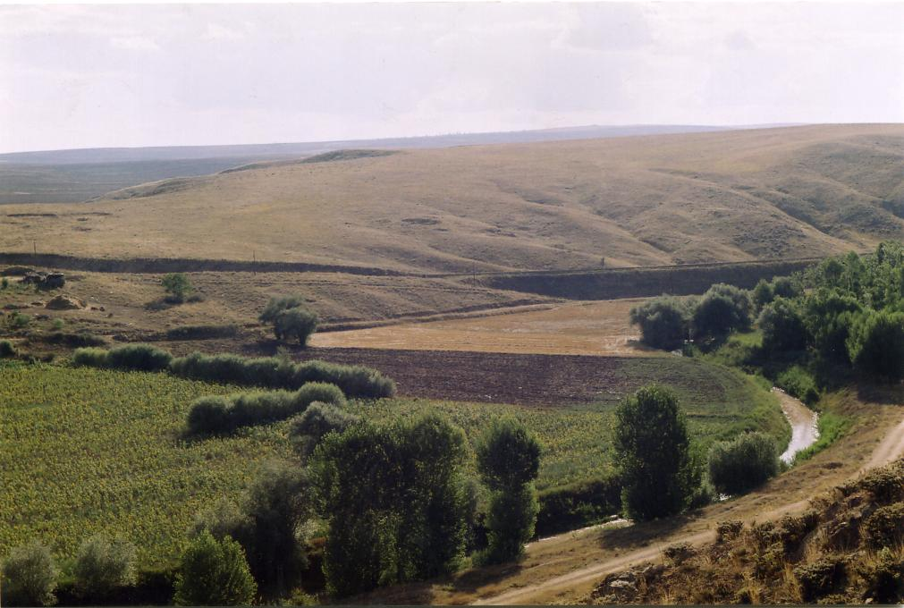 Yozgat'a bağlı Şefaatli ilçesinde bulunan Hamzalı köyünden bir görüntü.